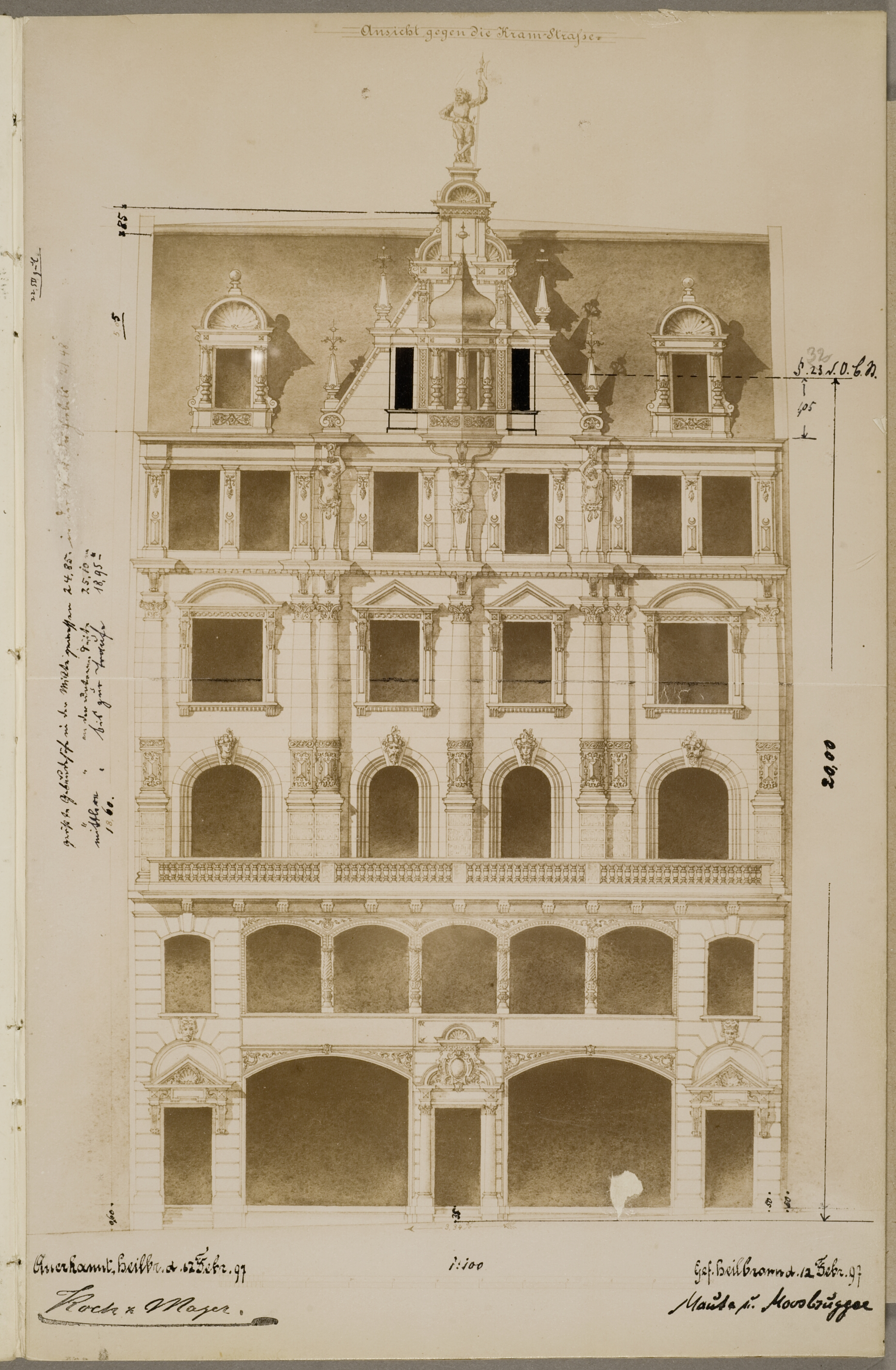 Plan des Hauses Kaiserstraße 29 in Heilbronn; erbaut von dem Bauunternehmen Koch und Mayer um 1897 nach Entwürfen der Architekten Hermann Maute und Theodor Moosbrugger